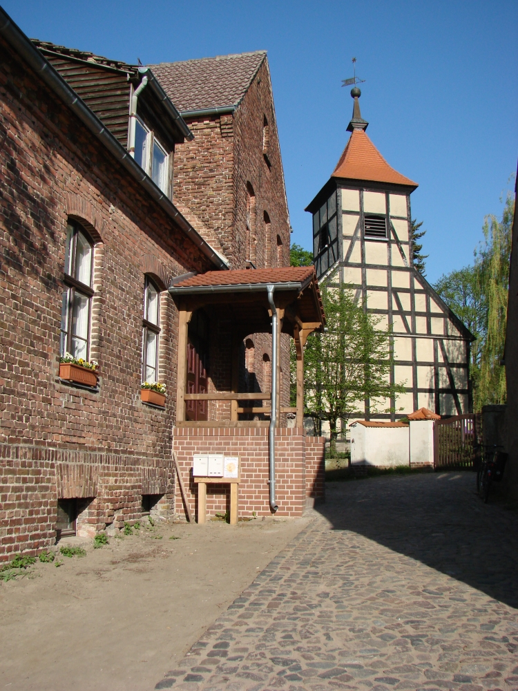 Alte Schule in Bergholz, Bundesland: Brandenburg, Deutschland, erbaut 1894, Baudenkmal